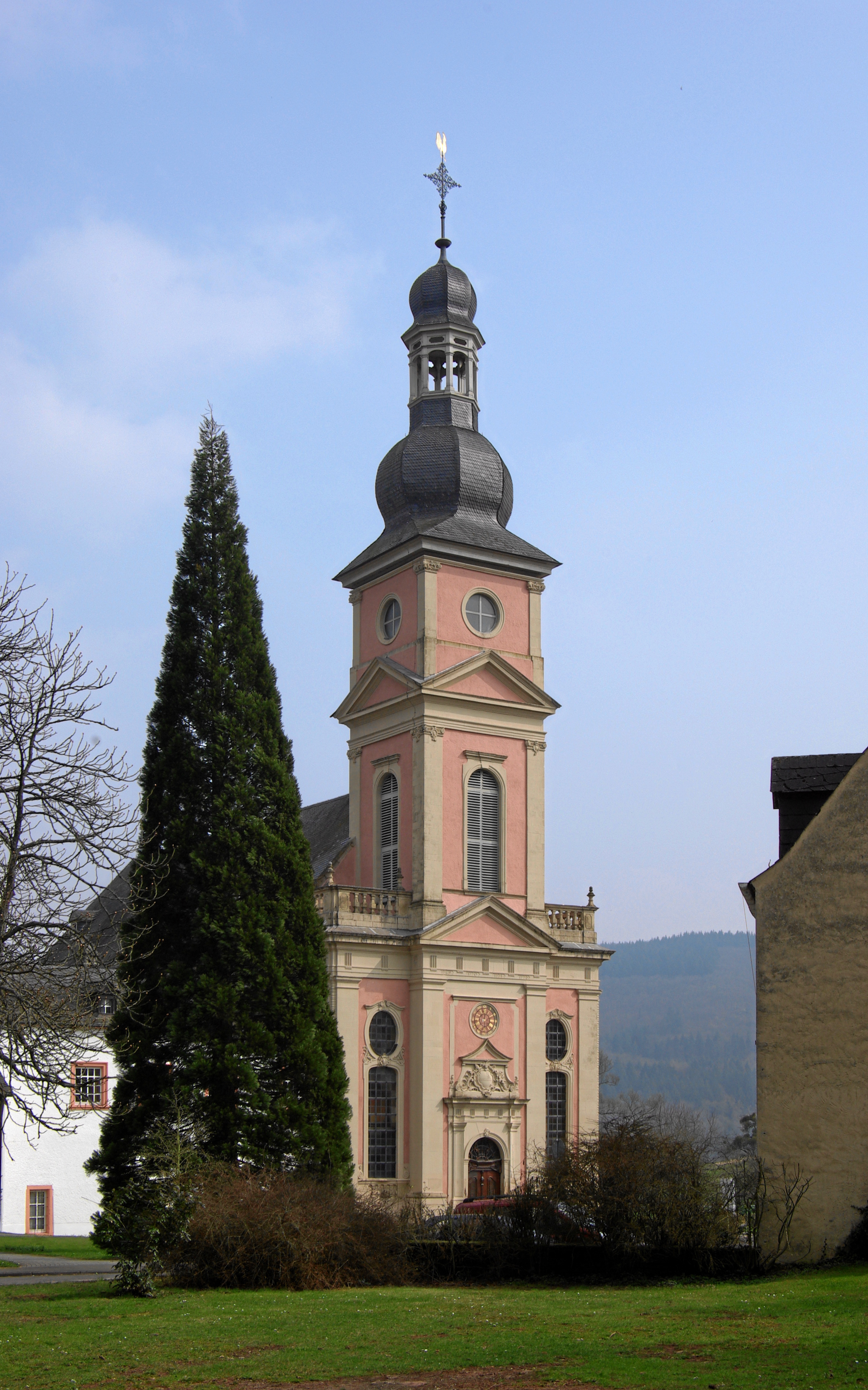 Klosterkirche Springiersbach